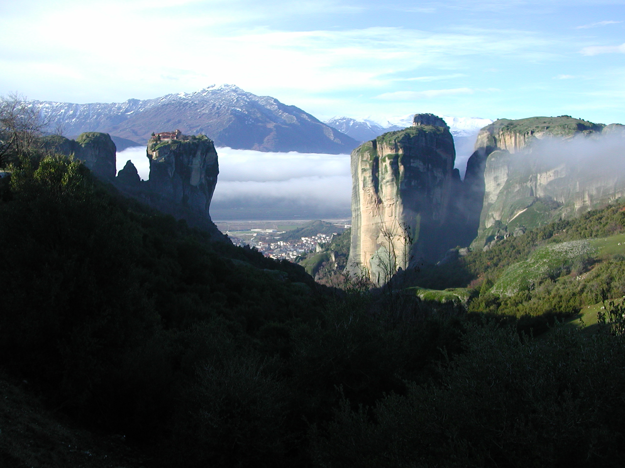 Manastir Agia Triada (Sveto trojstvo). Srpskohrvatski / српскохрватски: Manastiri Meteori nalaze se u središnjem delu prefekture.